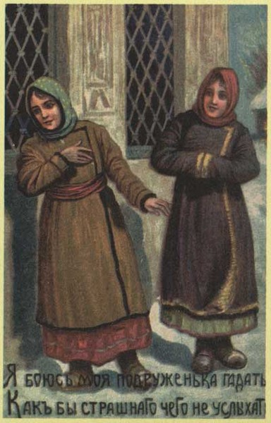 Гадание в Крещенский вечерок